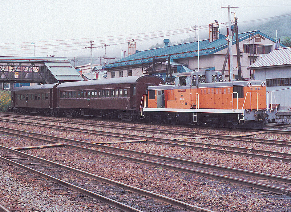 三菱石炭鉱業大夕張鉄道 DL-55 No.1+オハ1+スハ二6